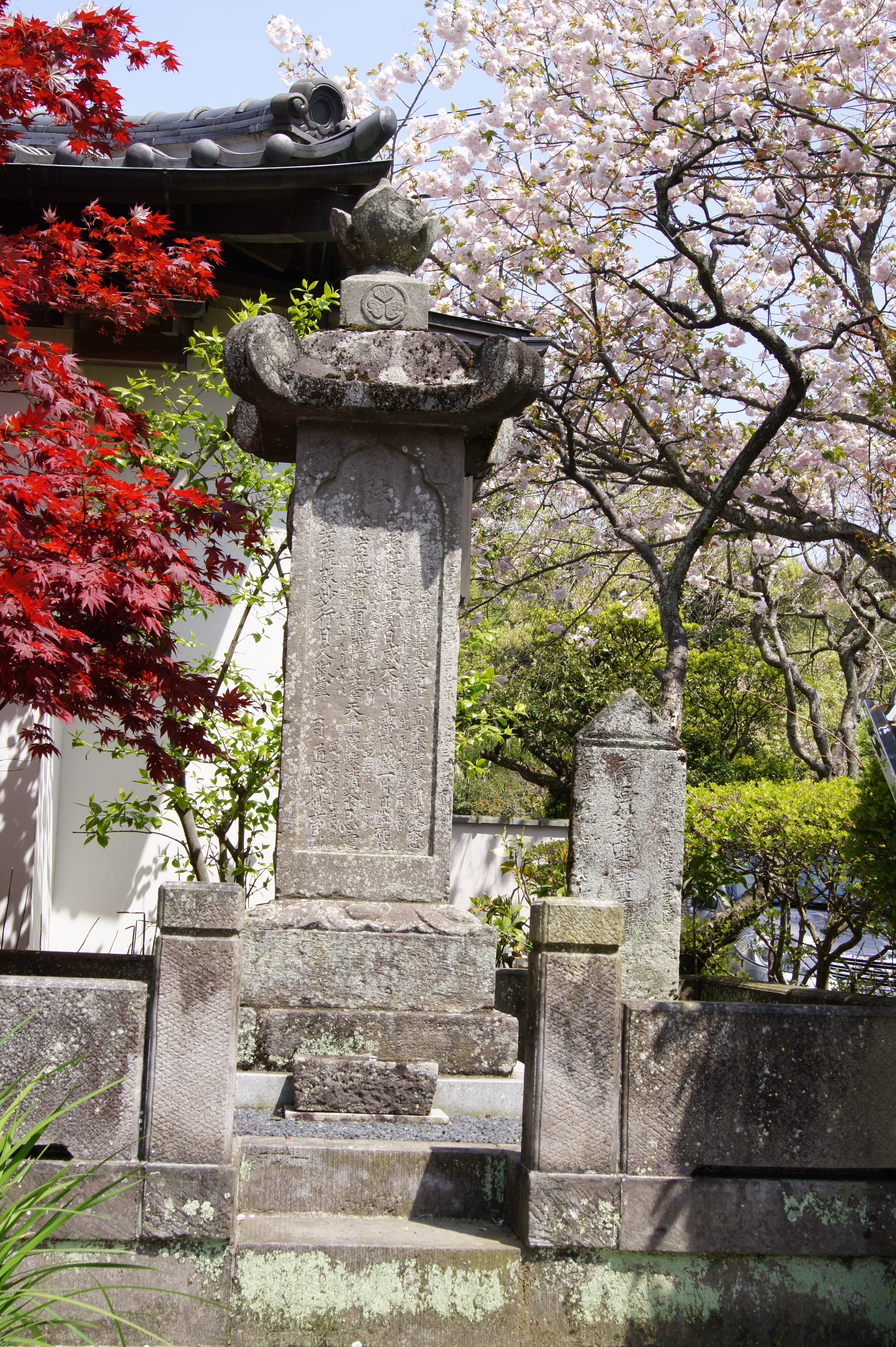 薬王寺の徳川忠長供養塔